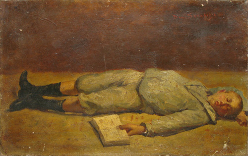 Dimitrie Serafim - Leneşul, ulei/pânză, semnat dreapta sus cu roşu, 22 x 33 cm.